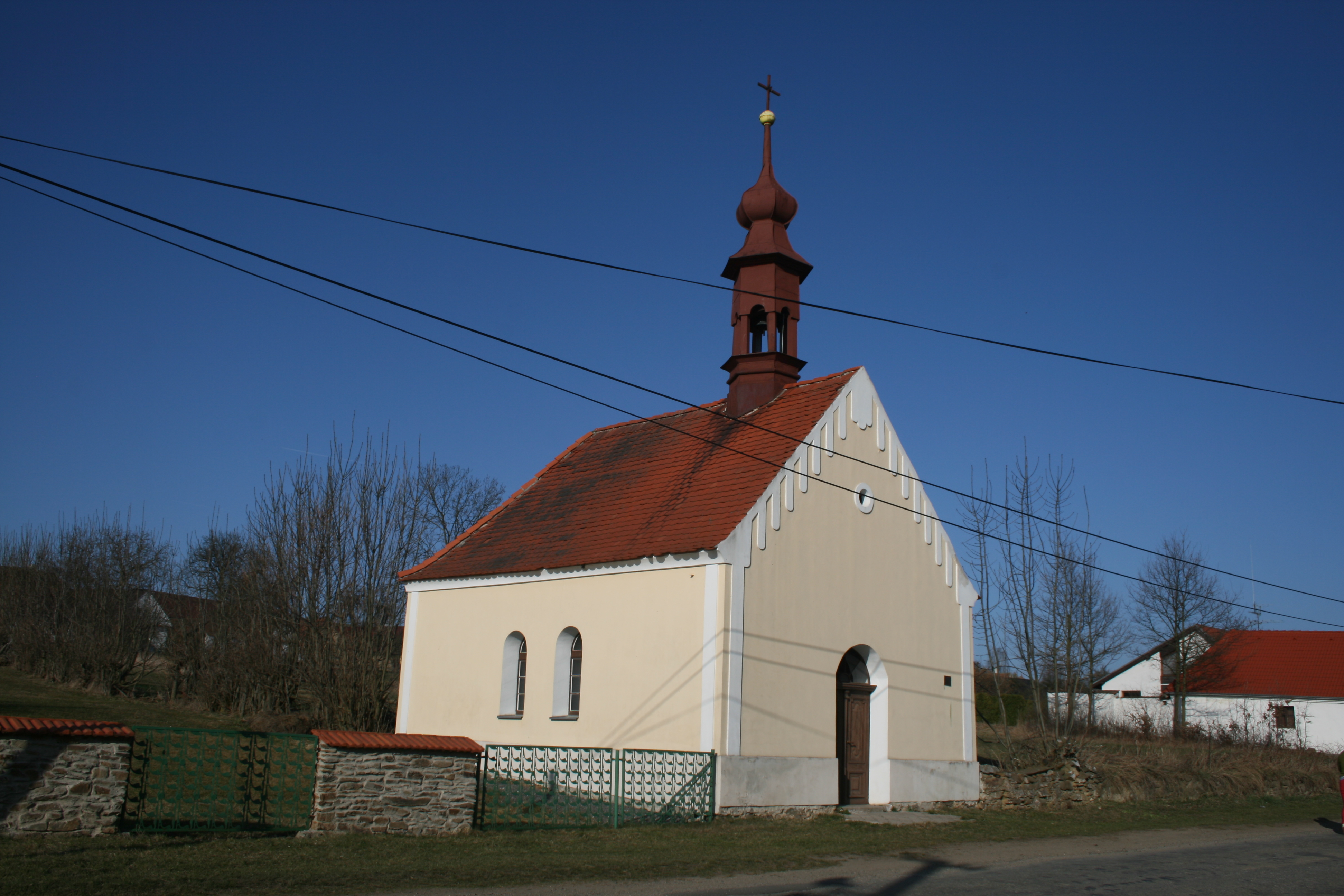 Debrník - Kaplička